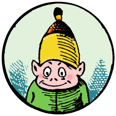 Wikignomecouleur003.png